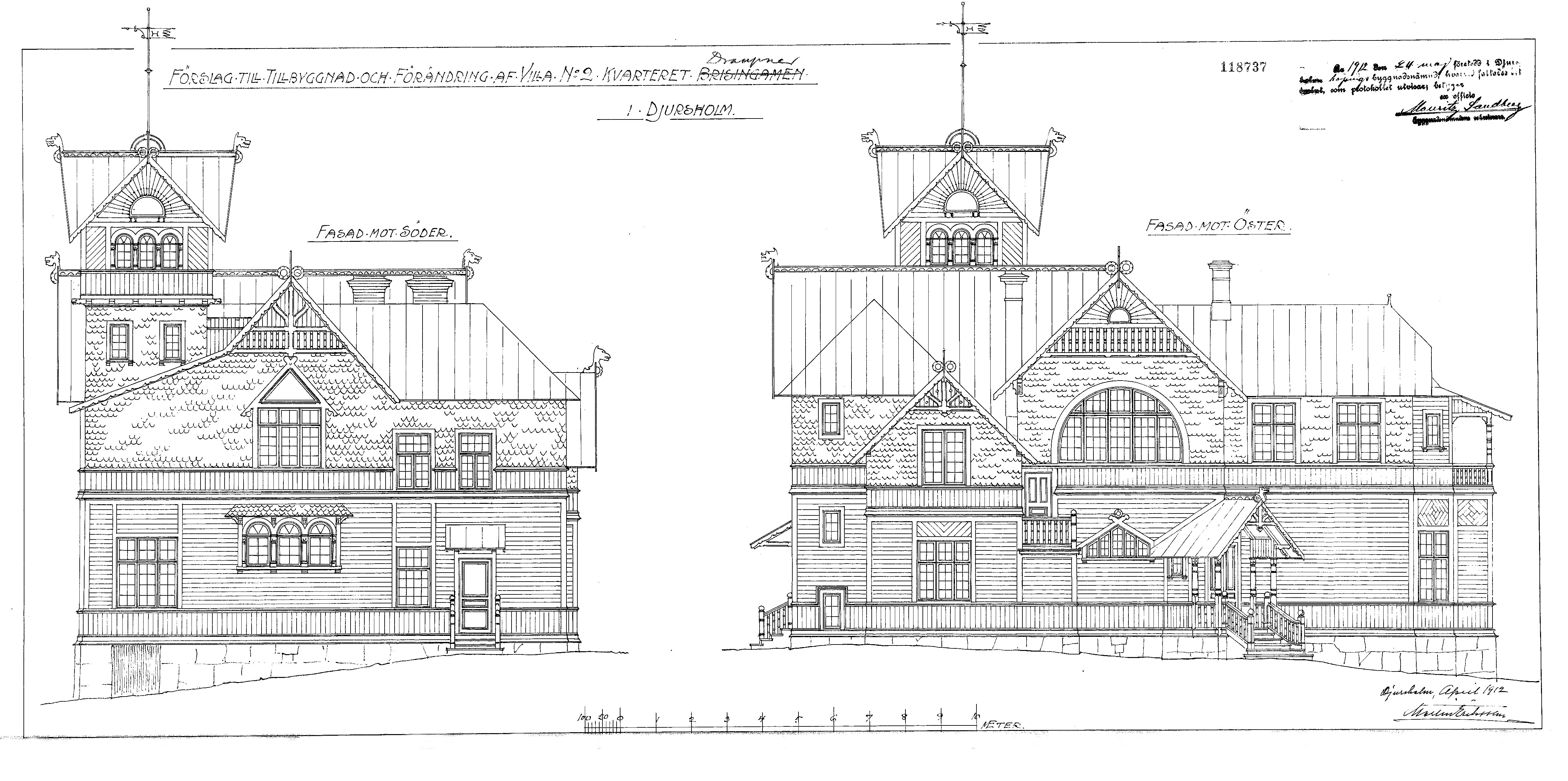 Villa Ugglebo, fasader mot öst och syd